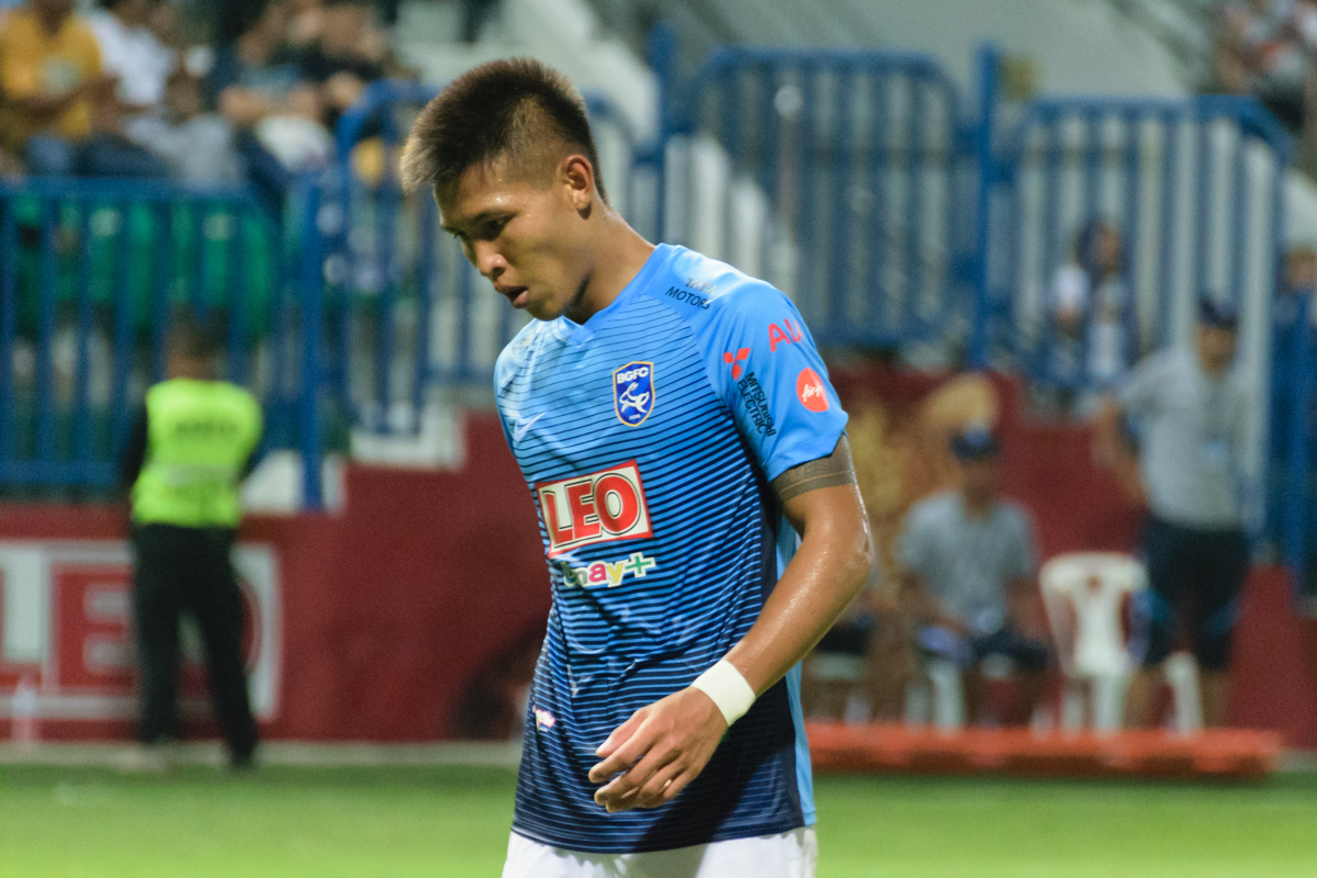 Piyachanok Darit